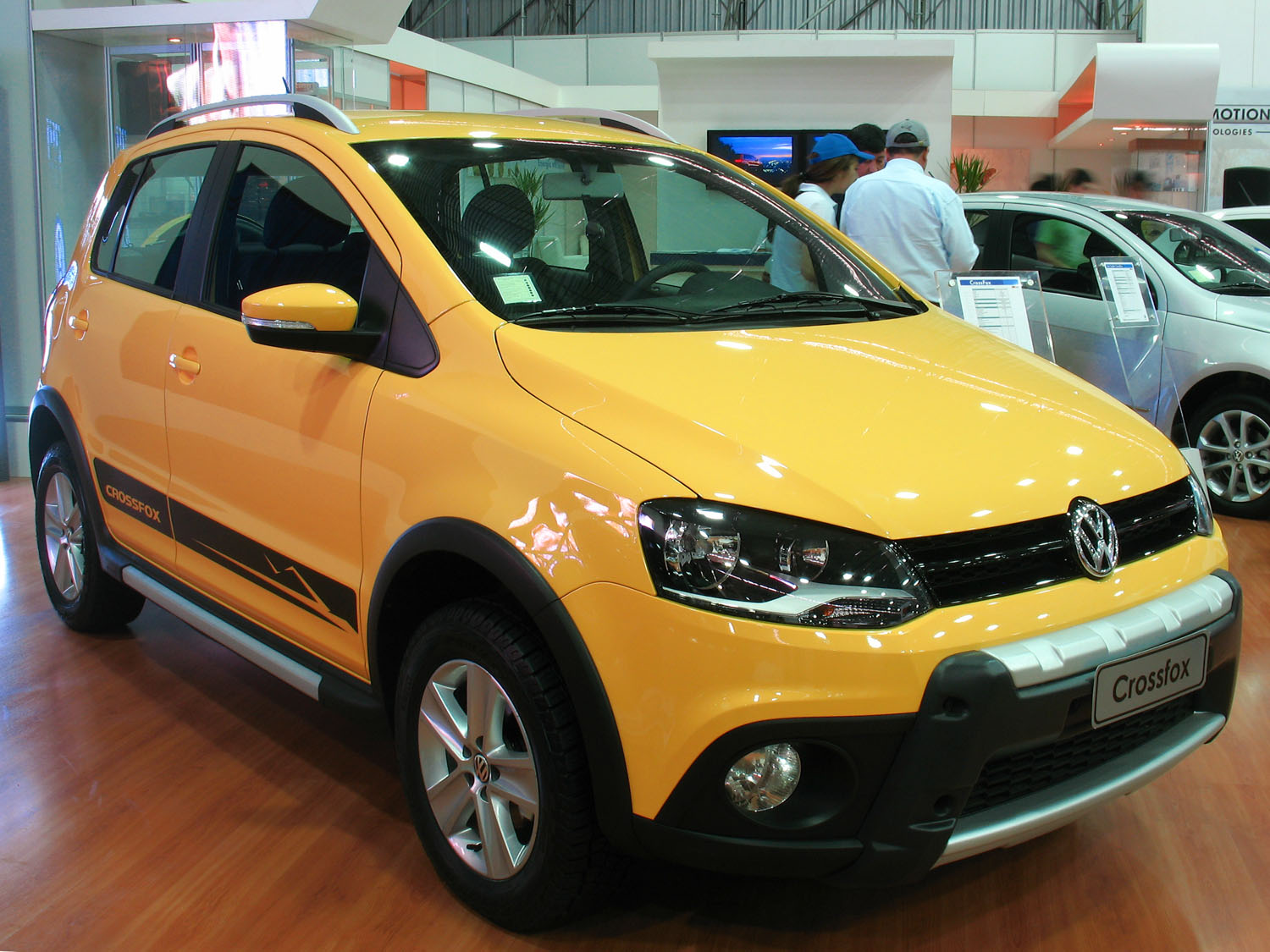 vwcrossfox162011